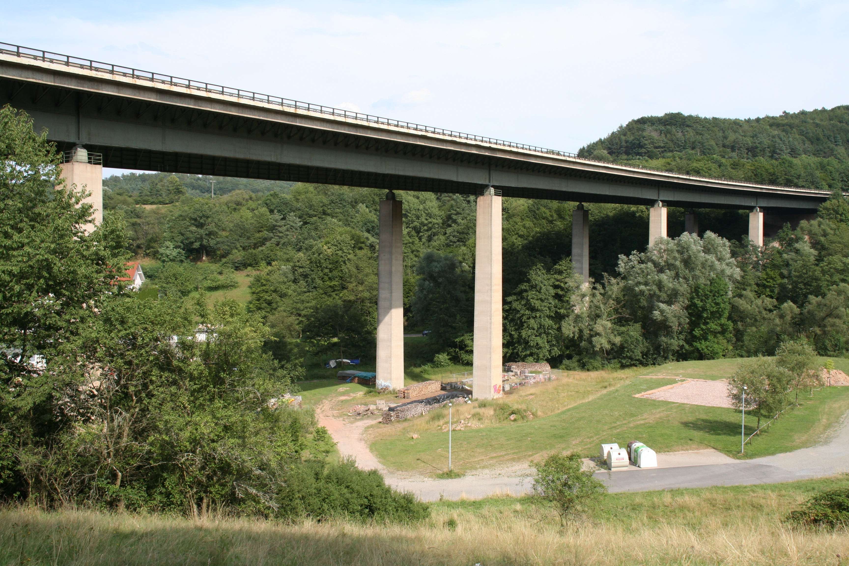 Kauppenbrücke der Autobahn A3 bei Waldaschaff